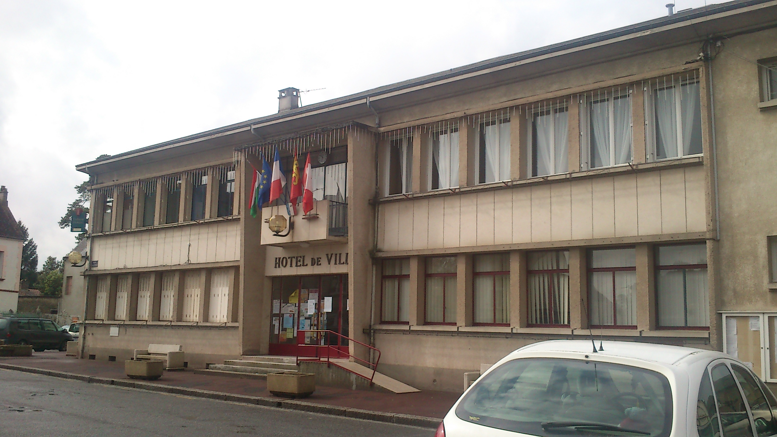 Hotel de Ville de Trun (Orne)